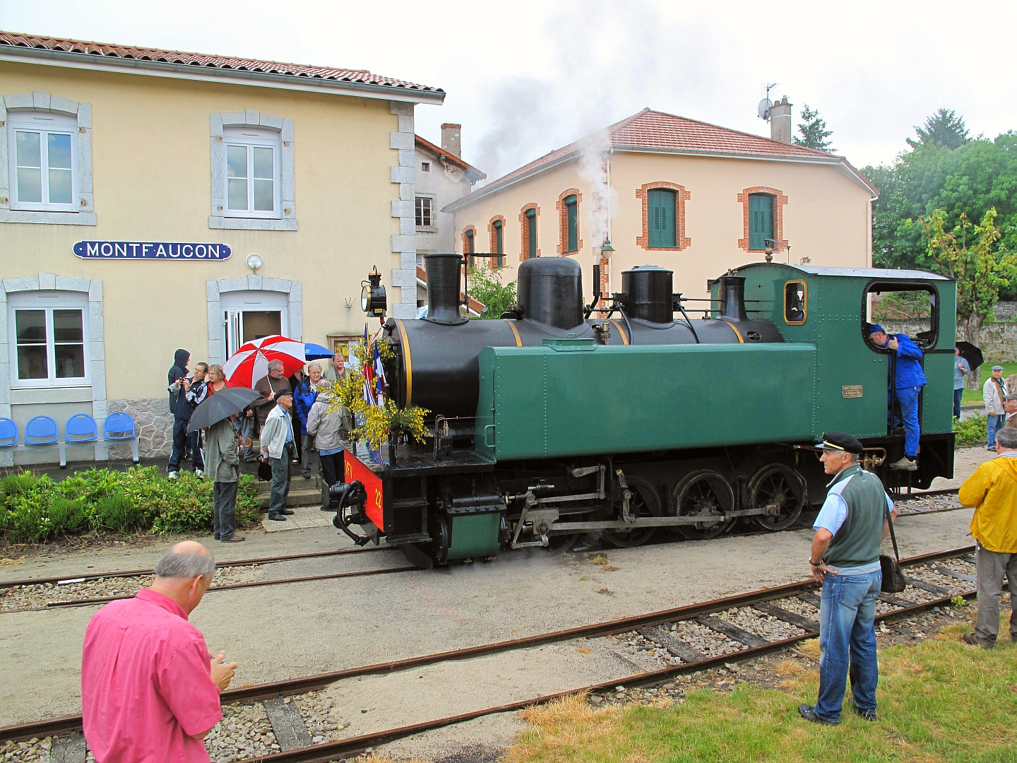 La 040 T 22 en gare de Montfaucon (Haute-Loire), sur le chemin de fer touristique des Voies Ferrées du Velay le 21 mai 2011.